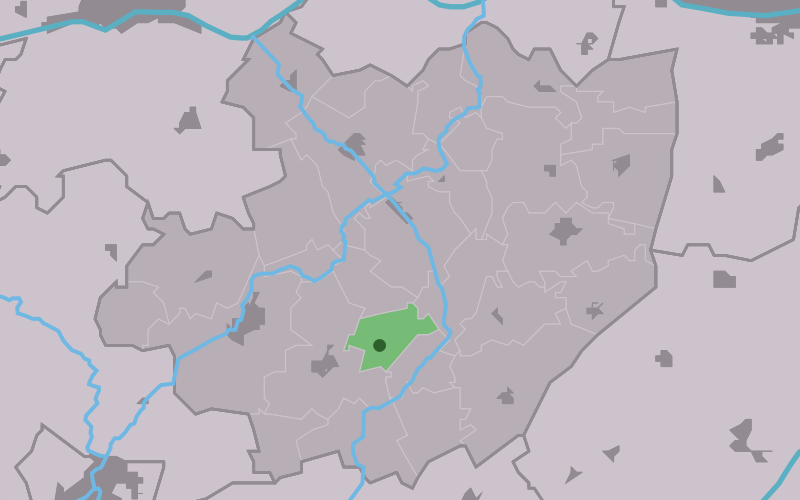 Kaartsje fan himrik fan Itens